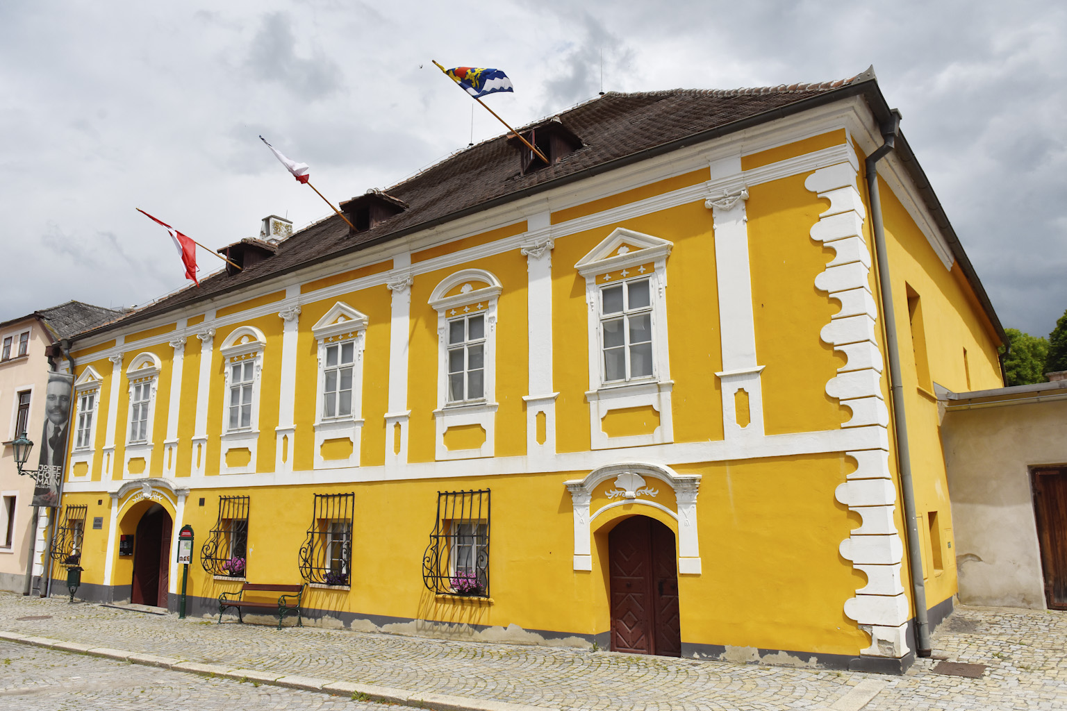 Rodný dům Josefa Hoffmanna v Brtnici u Jihlavy